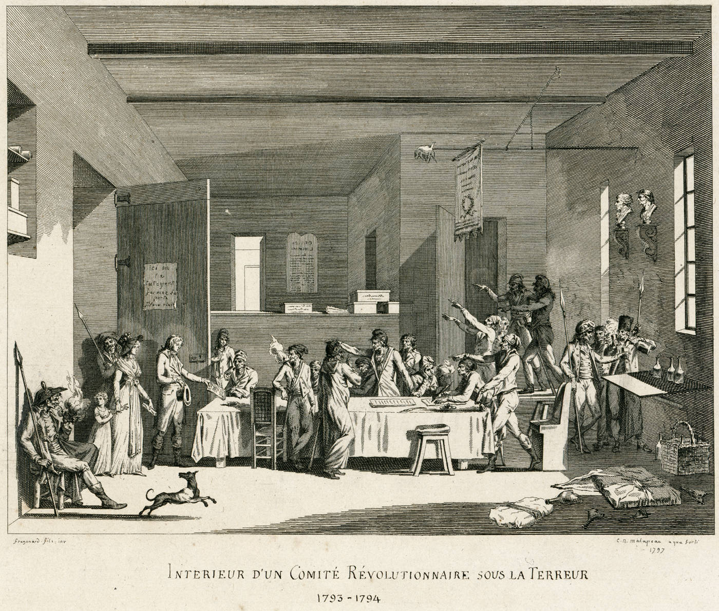 "Intérieur d'un comité révolutionnaire sous la Terreur. 1793-1794." Eau-forte de Malapeau ("C. N. Malapeau, aqua forte") d'après Fragonard fils ("Fragonard fils inv."), 27.6 cm × 34.5 cm, 1797.